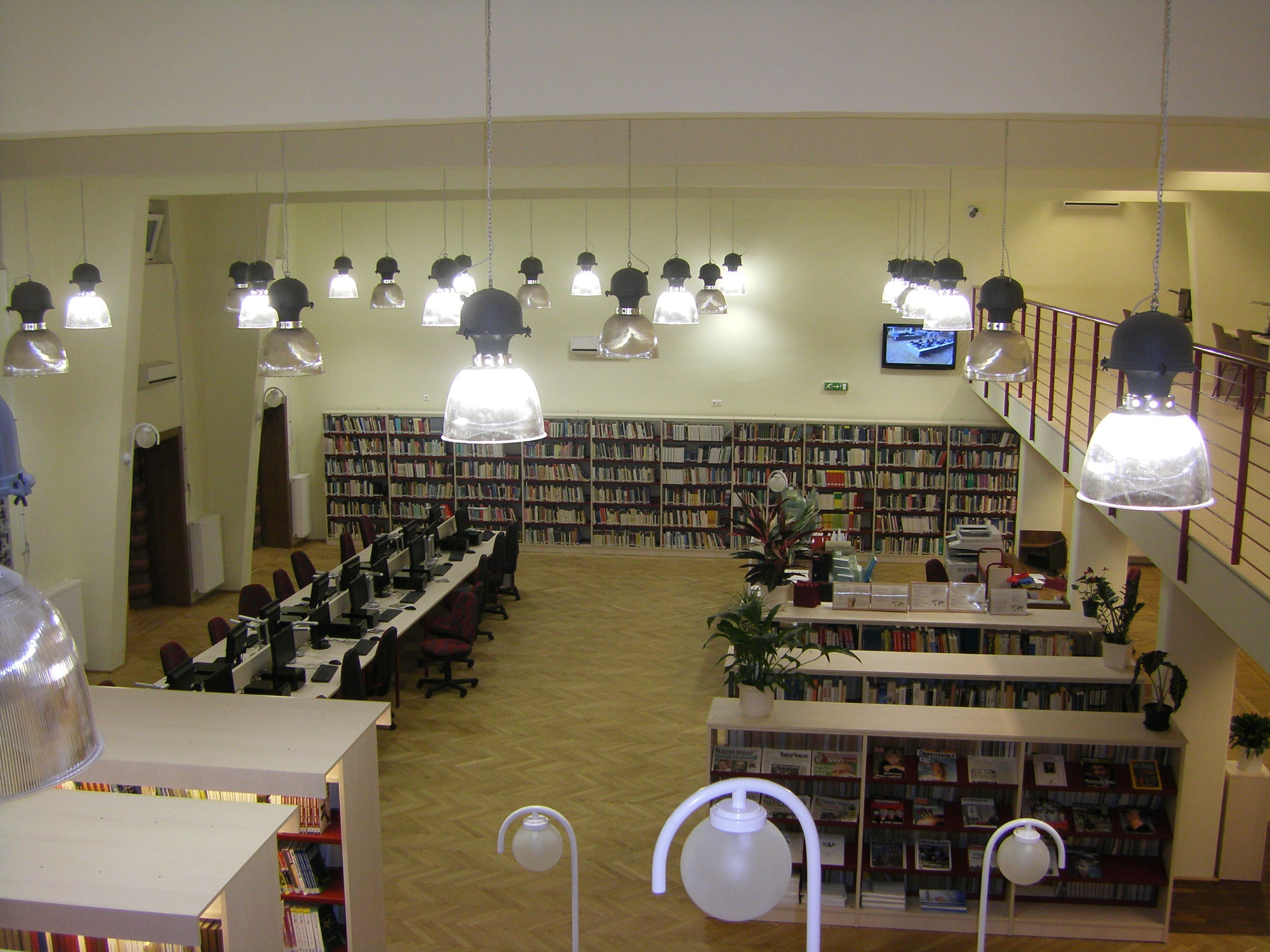 KF KIK MGSZK Infotér